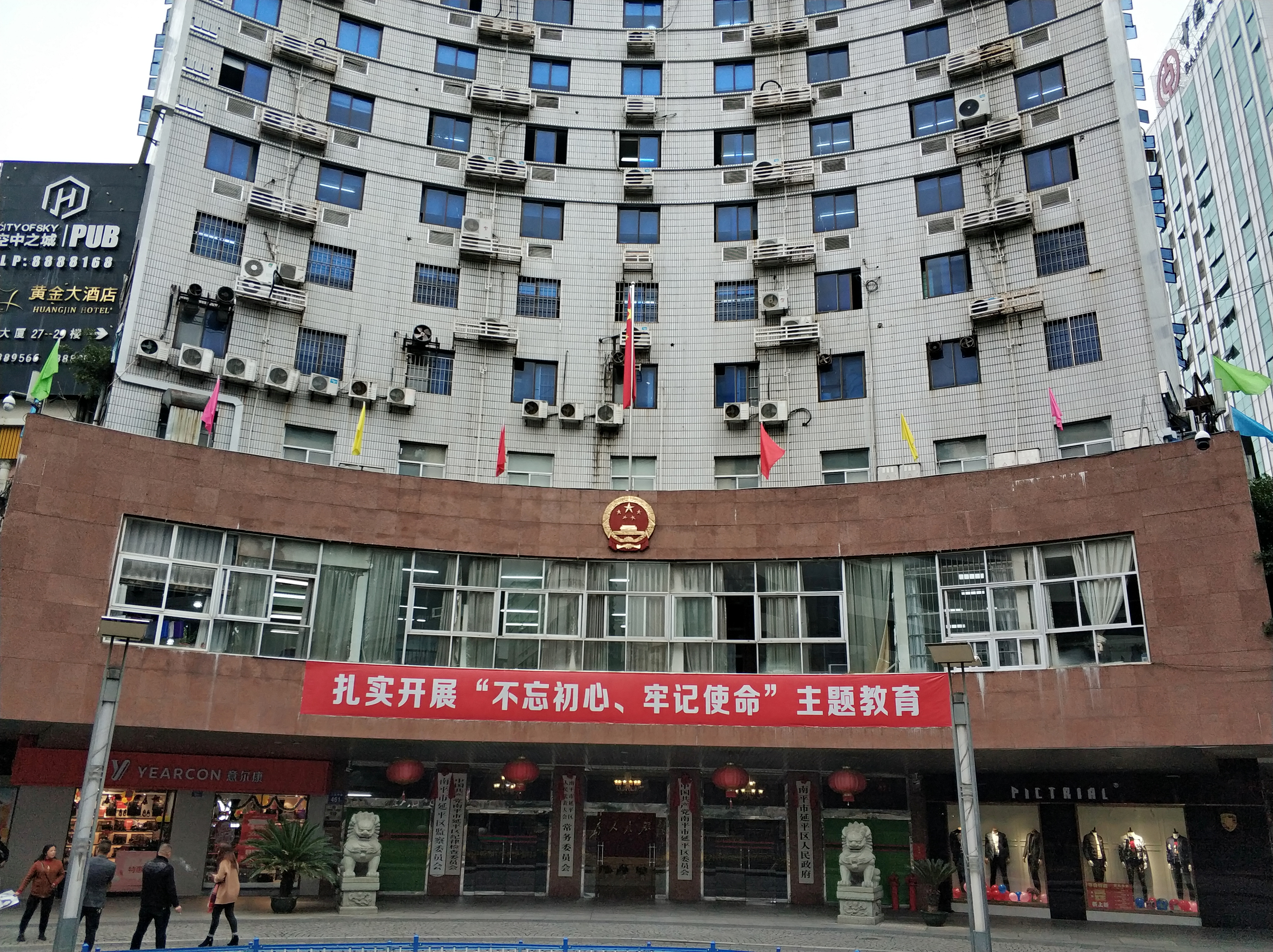 中文（中国大陆）: 南平市延平区